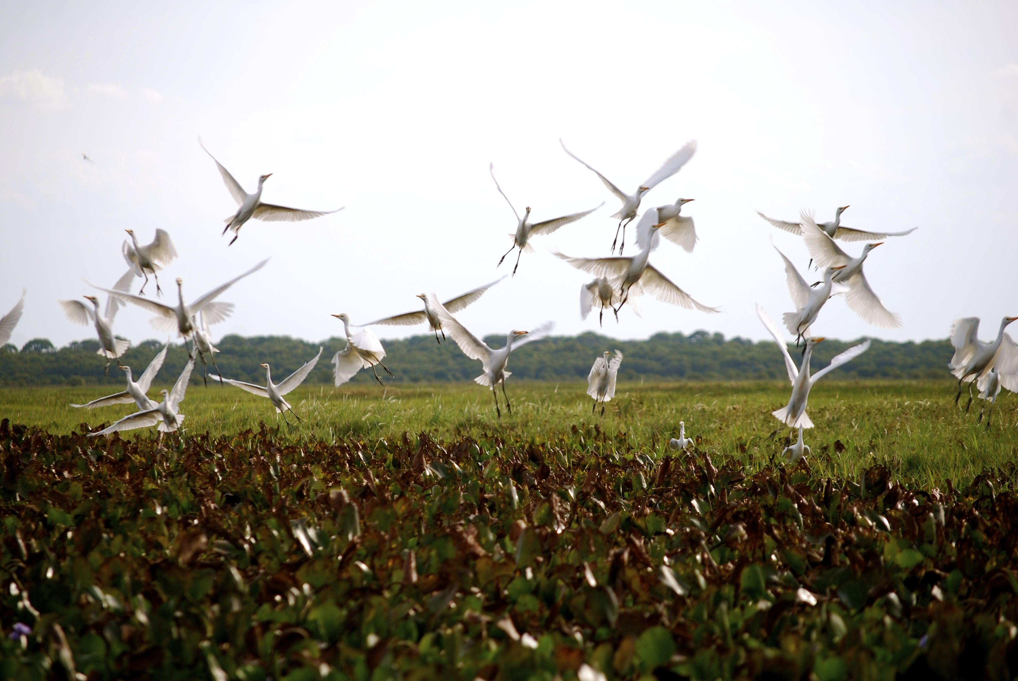 Esta foto fue tomada en los módulos agroecológicos del Hato El Cedral en el Estado Apure donde se observa el cortejo antes del apareamiento de una comunidad de garzas blancas